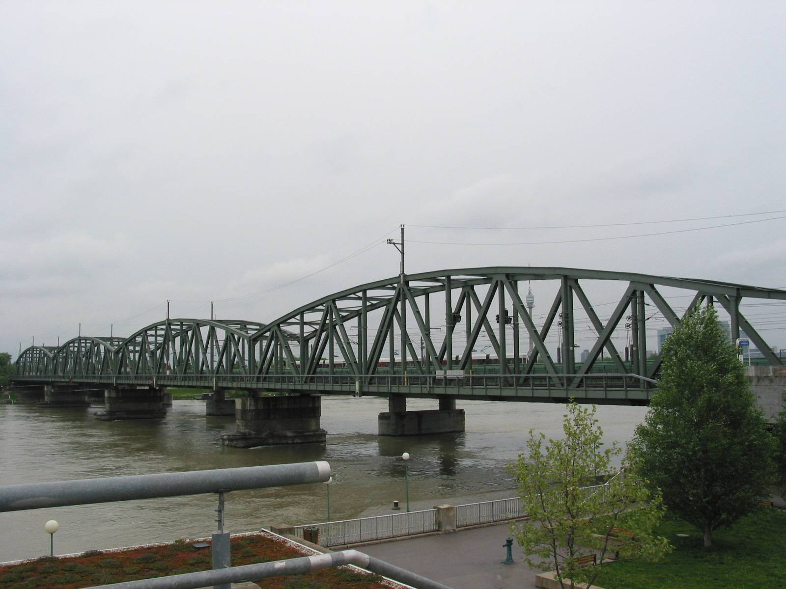 Nordbahnbrücke, Vienna, 2006-04-30 selfmade photo